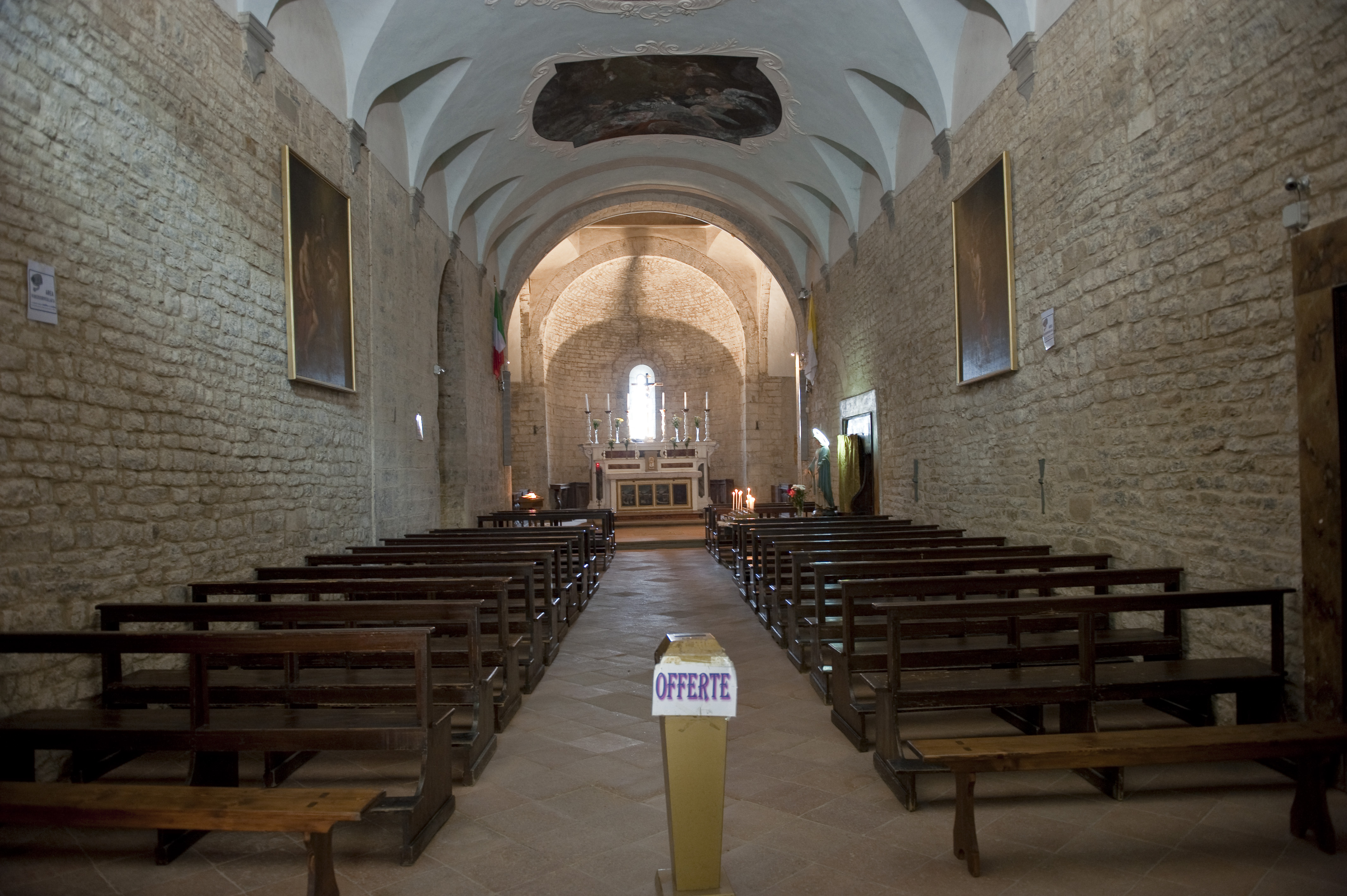 Navata della chiesa abbaziale di Badia a Coltibuono